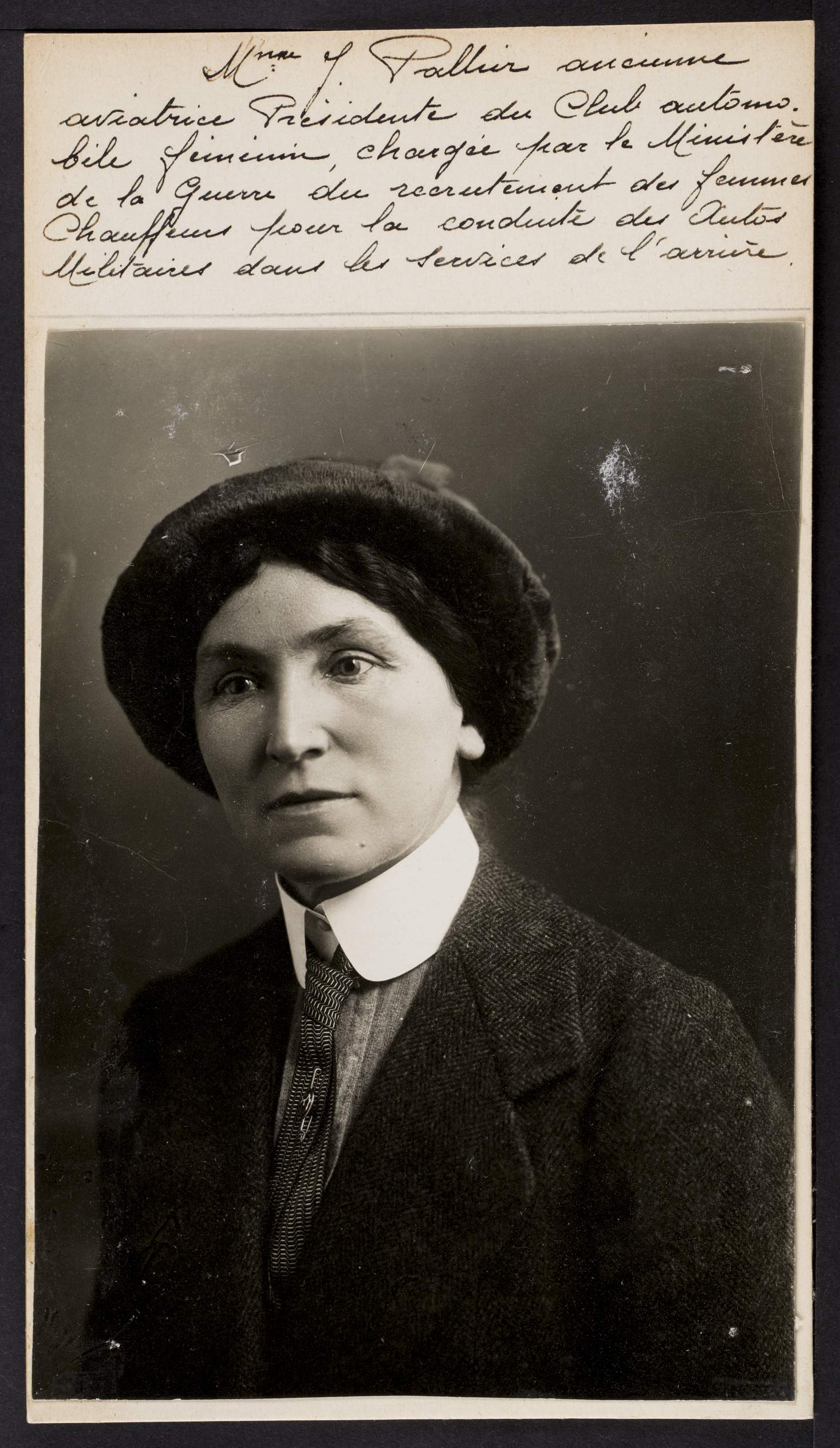 Mme J. Pallier, ancienne aviatrice, présidente du club automobile féminin, chargée par le ministère de la guerre du recrutement des femmes chauffeurs pour la conduite des autos militaires dans les services de l'arrière.